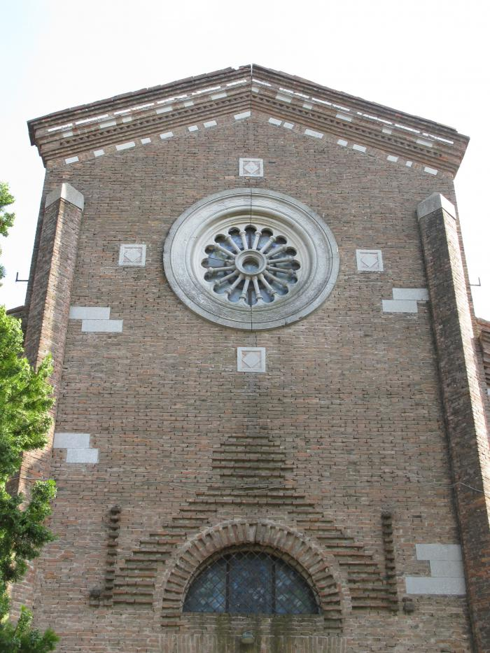 La facciata della chiesa di San Biagio Vescovo e Martire nella frazione di Gavello (Mirandola)